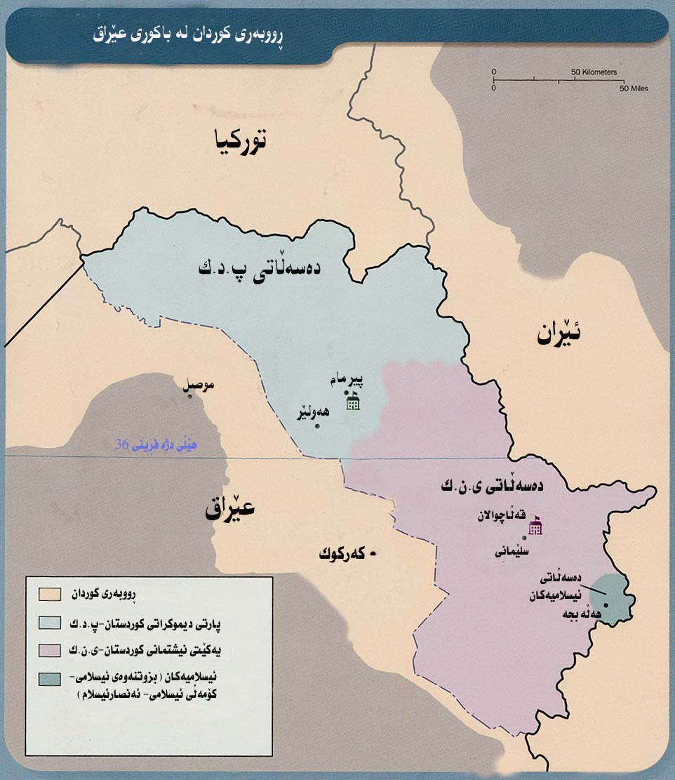 Kurdî: شەڕی ناوخۆ